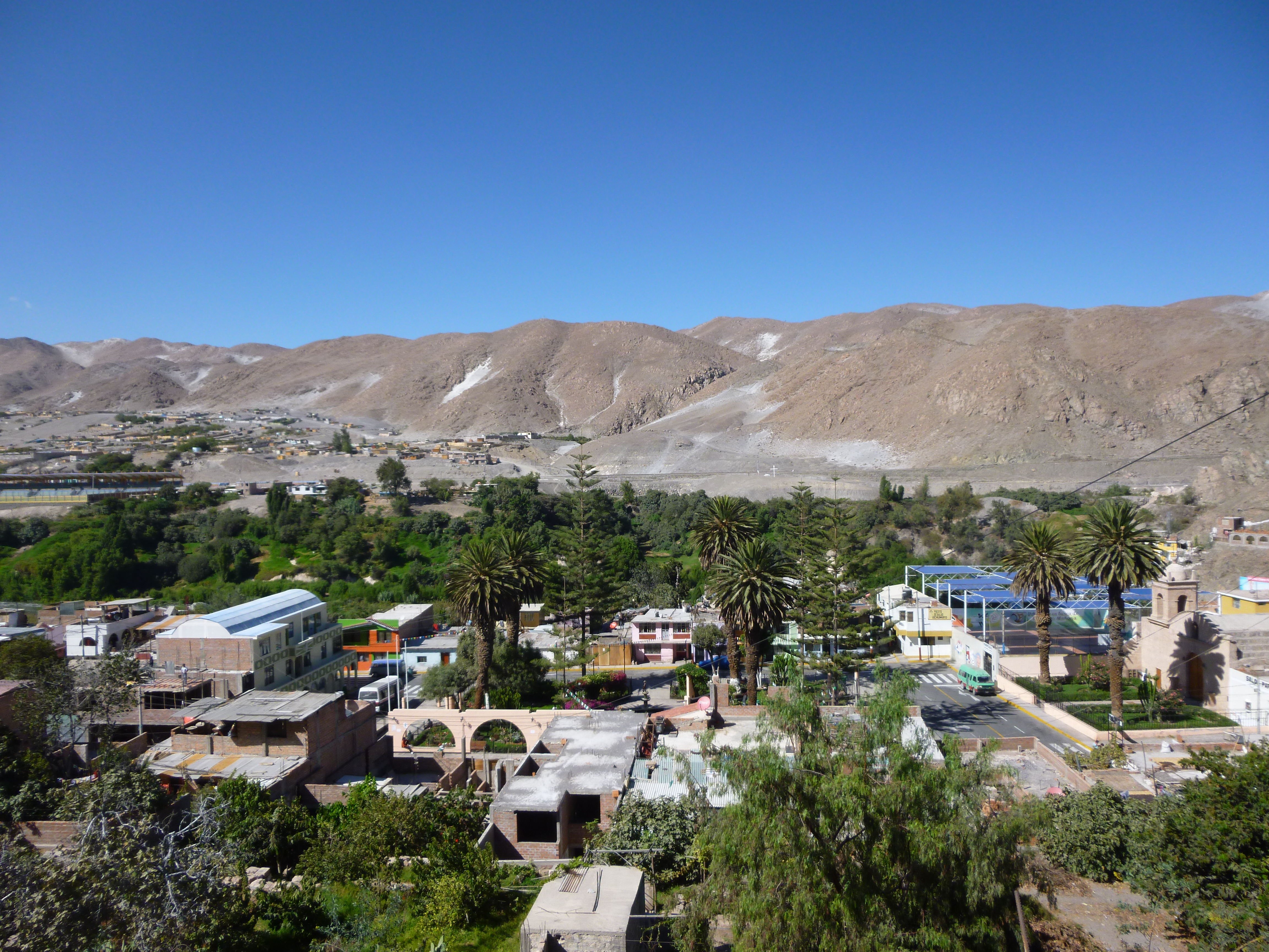 Vista del Poblado de Uchumayo, en Arequipa, Perú.